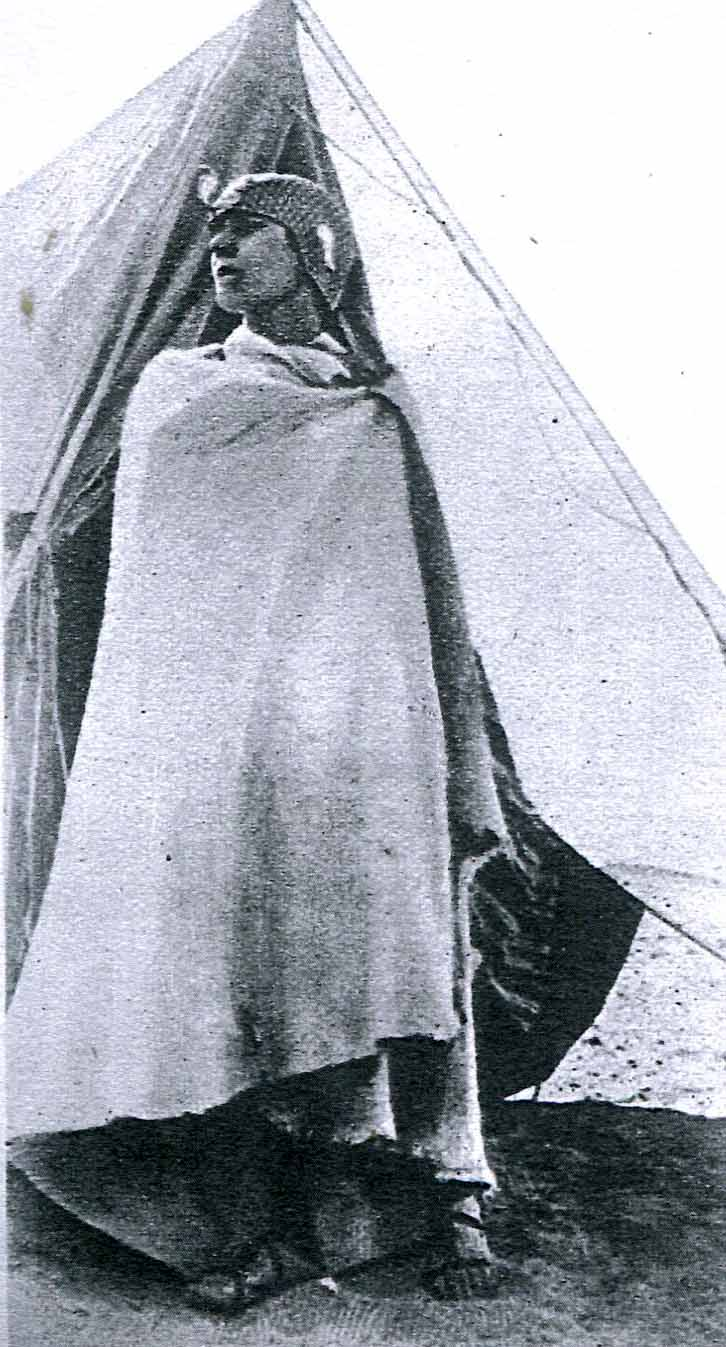 Stacia Napierkowska nel deserto durante le riprese di l'Atlantide, regia di Jacques Feyder 1921. prod SGDICC - Paris